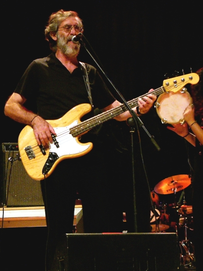 bassist Francisco García performing with Nuevo Mester de Juglaría in Castelló